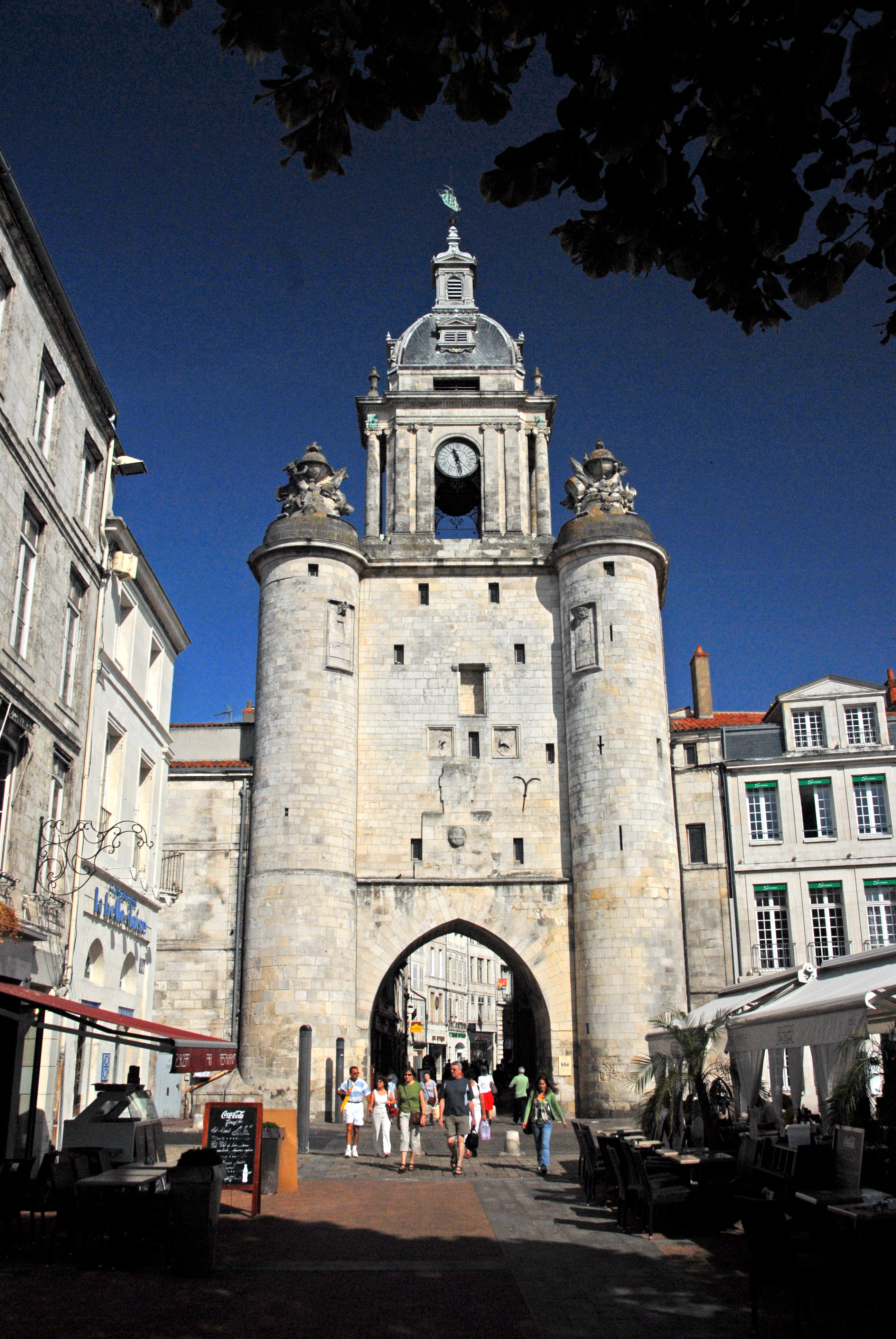 La Rochelle, Tour de la Grosse Horloge, Hafenseite